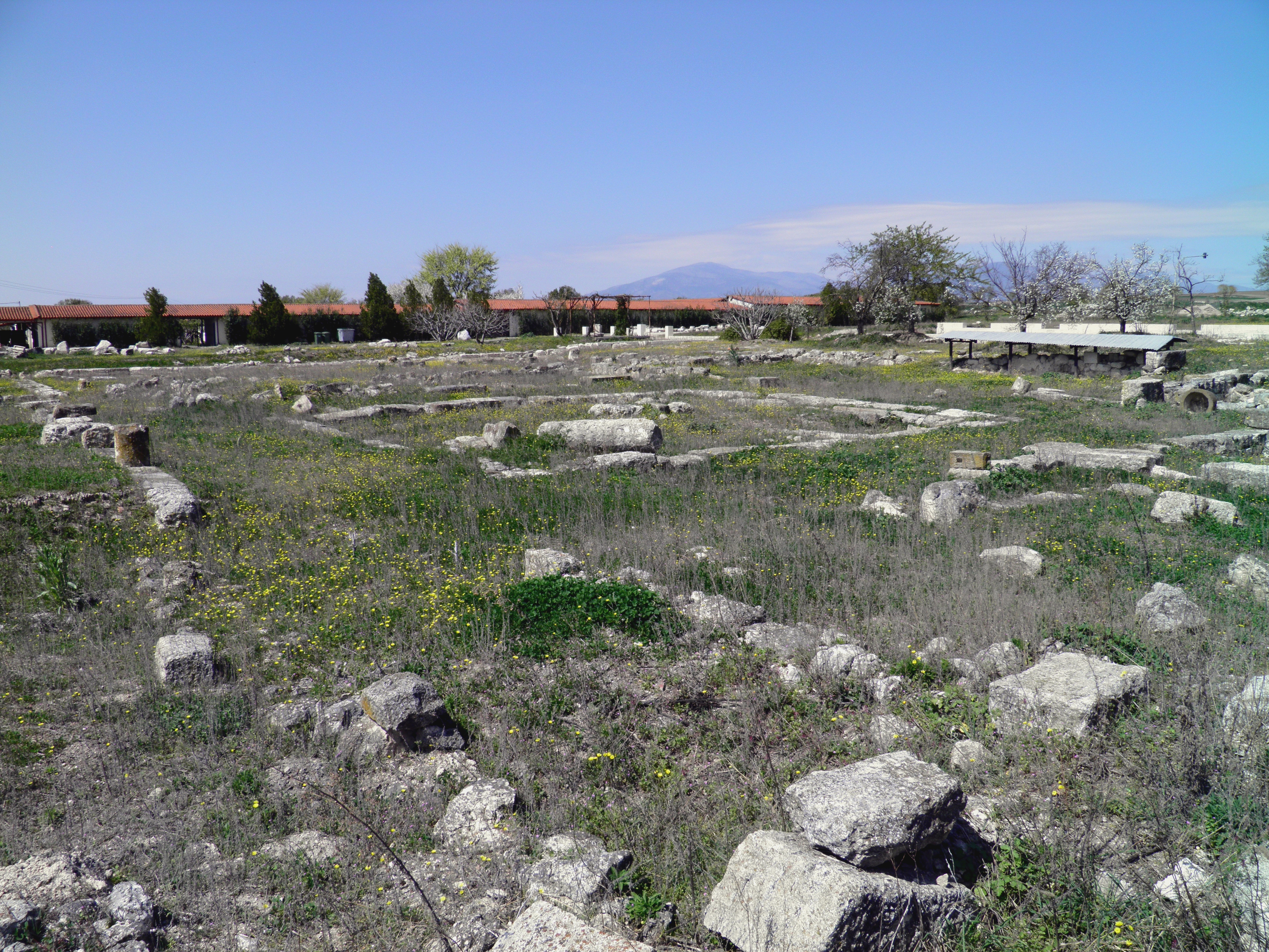 Ancient Pella